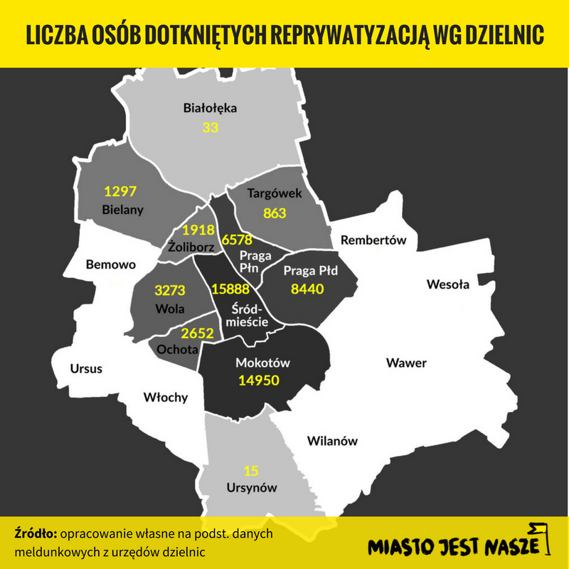 Mieszkańcy zreprywatyzowanych nieruchomości według dzielnic